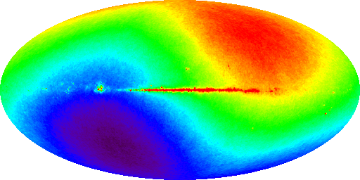 Mapa da radiação cósmica de fundo que mostra a anisotropia dipolar causada pelo movimento do sol e da galáxia, produzido com dados do satélite WMAP. O efeito doppler faz que a temperatura medida da radiação cósmica de fundo seja ligeiramente maior na direção do movimento e menor na direção oposta. No mapa, azul corresponde a 2.721 Kelvin e vermelho é 2.729 Kelvin. O plano galáctico corresponde à linha horizontal central, onde pode-se observar a interferência da Via Láctea.